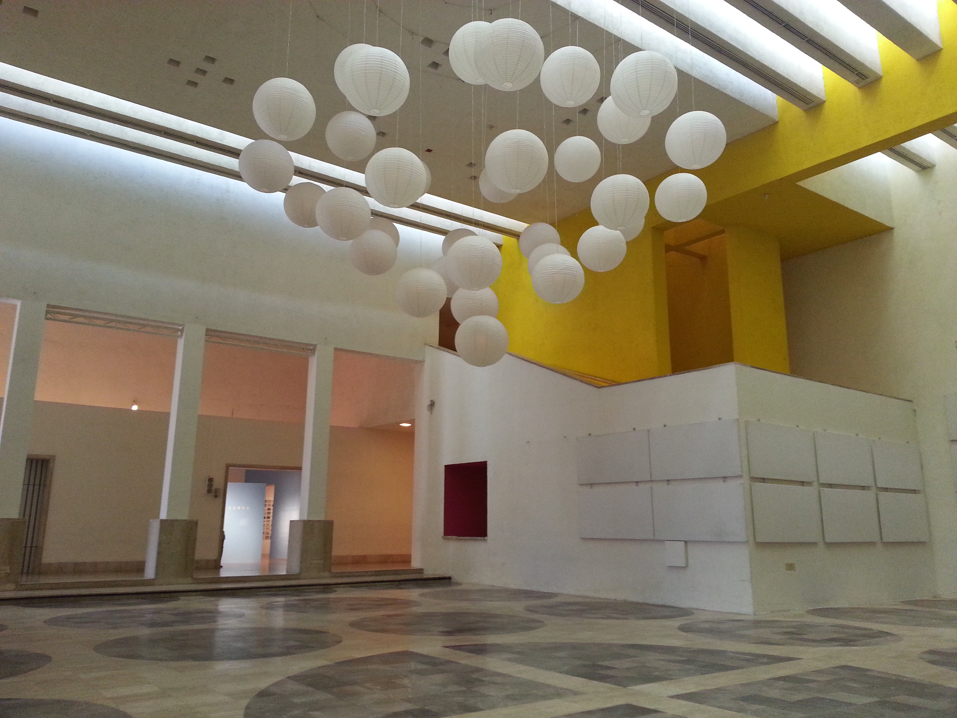 MARCO, interior